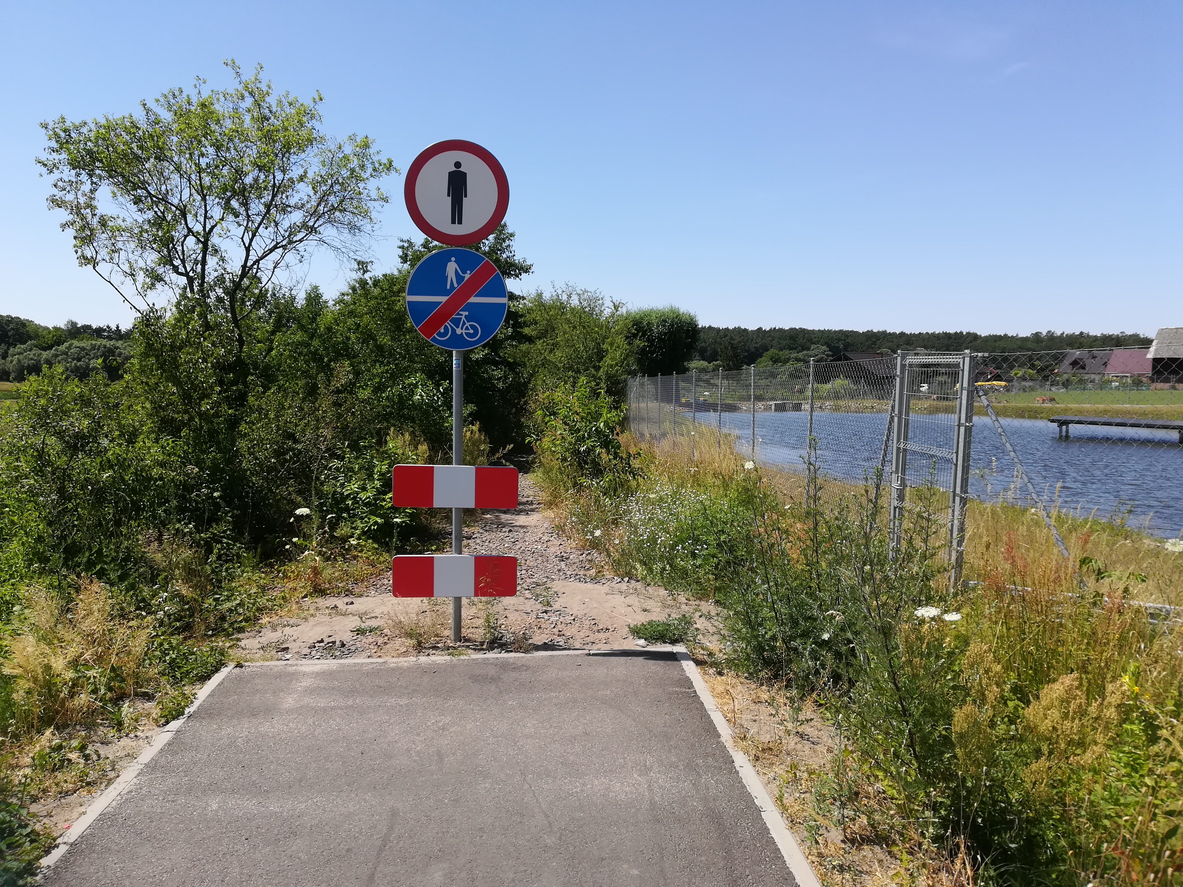 Trasa rowerowa Oborniki - Stobnica po dawnej linii nr 381 z Obornik do Wronek.